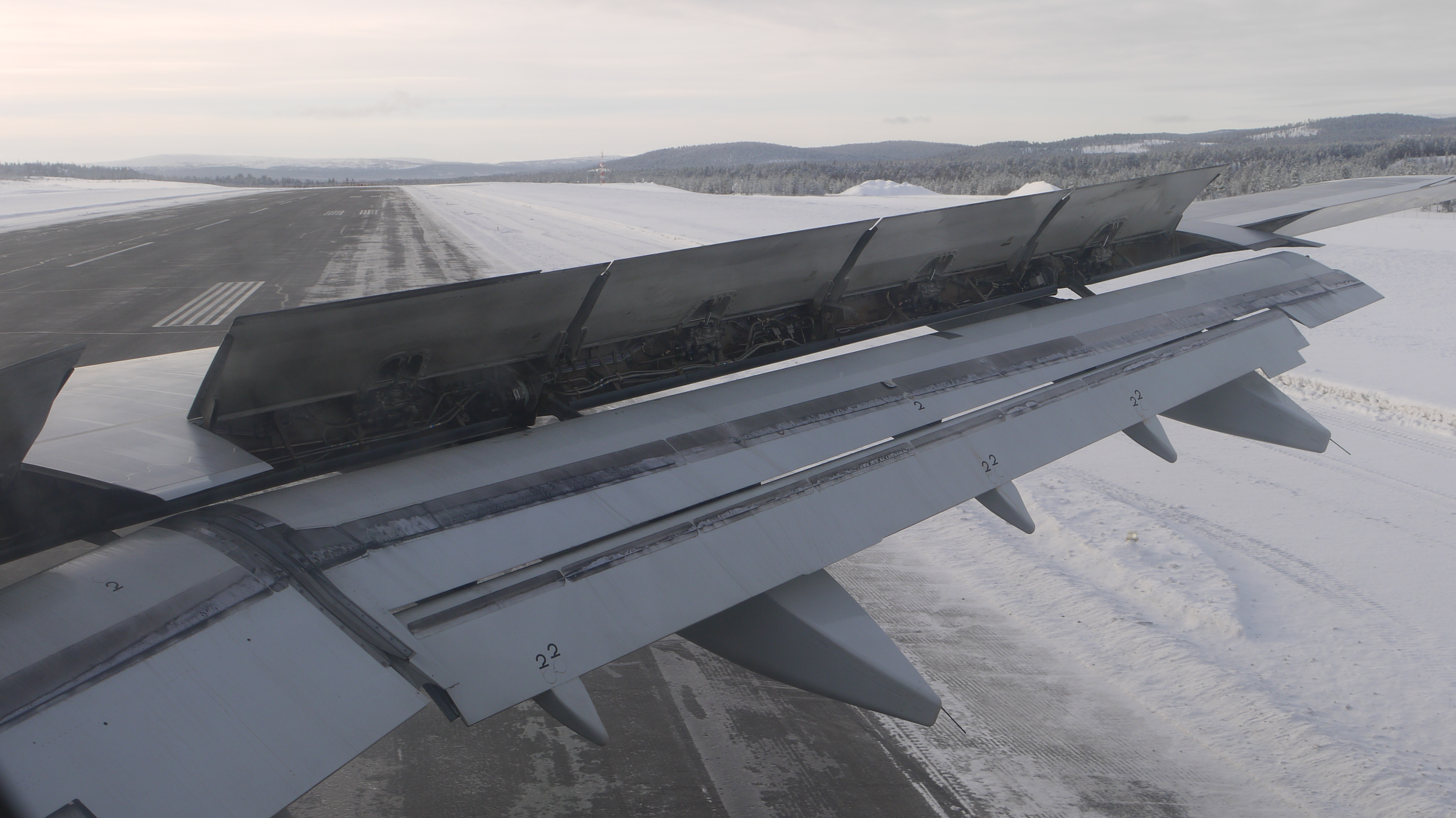 Finnairin Airbus A321 -matkustajakoneen oikean puoleinen siipi. Spoilerit ja laskusiivekkeet ovat täysin avattuna hetki laskun jälkeen. Kuvattu Ivalon lentoasemalla helmikuussa 2017.